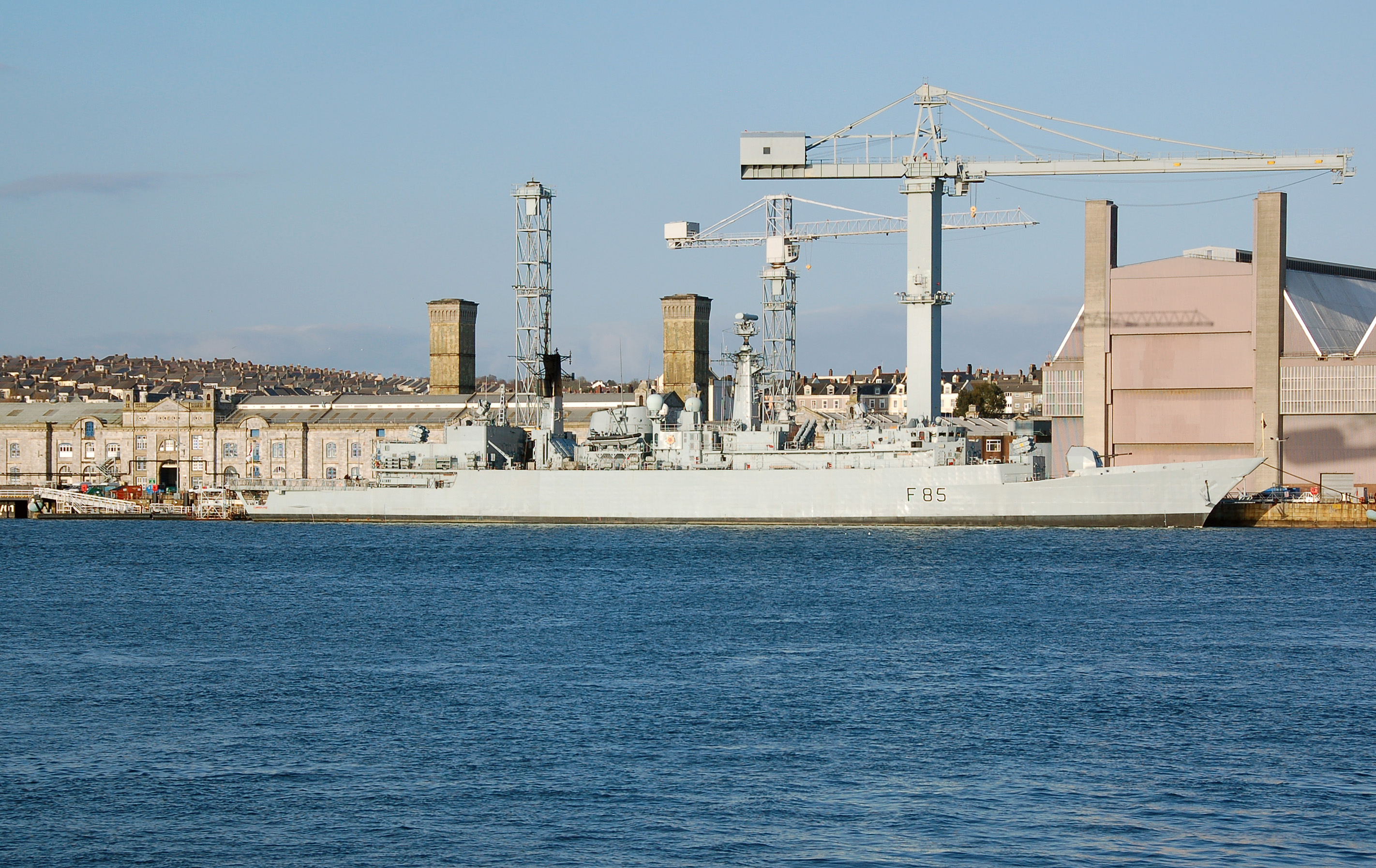 HMS Cumberland (F85) in Devonport Dockyard, UK